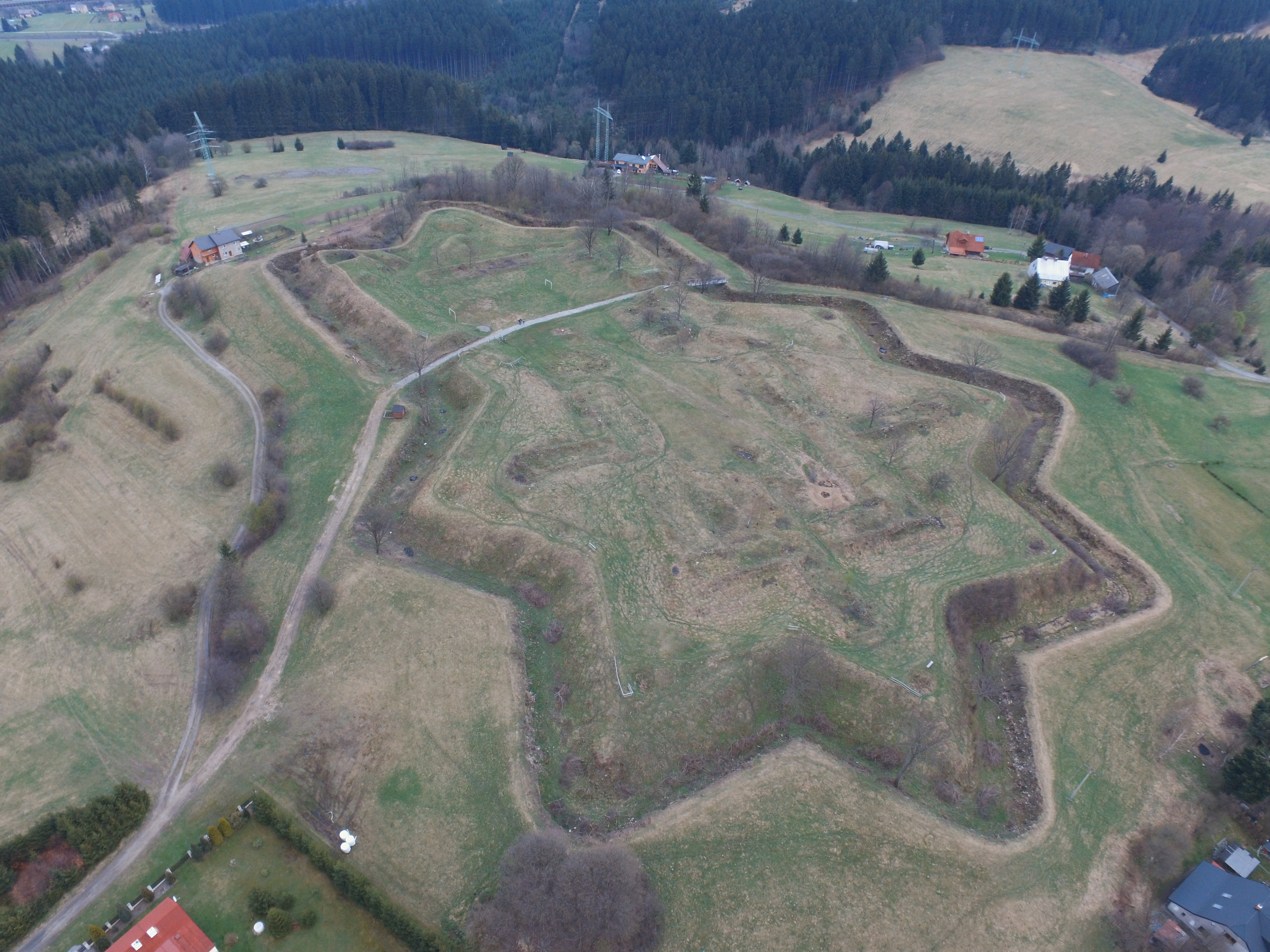 Fortyfikacja Szańców Jabłonkowskich w pobliżu przełęczy Jabłonkowskiej